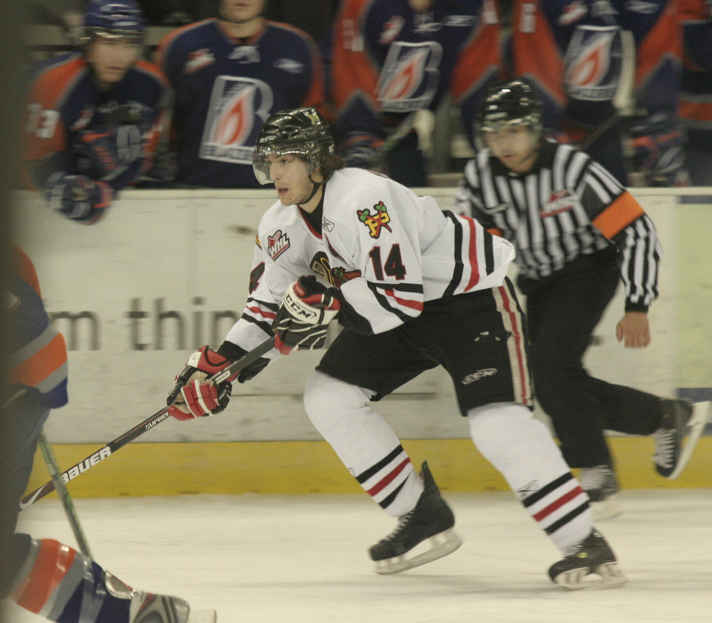 #14 - Luke Walker, Portland Winter Hawks